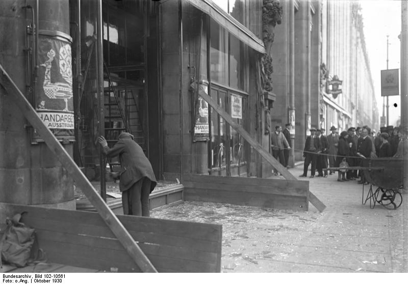 Zu den grossen Tumulten in der Leipziger Straße in Berlin am Tage der Reichstagseröffnung, wo viele Schaufensterscheiben zertrümmert wurden. Ein vollständig demoliertes Schaufenster des Warenhauses Wertheim in der Leipziger Strasse in Berlin.